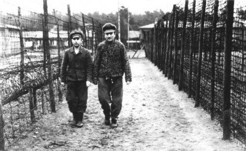 Joseph Johann (Jupp) Kotälla (l) die optrad als waarnemend kampcommandant en Oberle, nu zelf gevangen in 'De Rozentuin' in kamp Amersfoort. In de Rozentuin moesten gevangenen uren of zelfs dagenlang rechtop staan, in een smalle afrastering van prikkeldraad, zonder eten of drinken in weer en wind. Gevangenen die omvielen werden met stokslagen weer overeind gejaagd. Kotälla is een van de beruchtste kampbeulen van Amersfoort, en had als bijnaam 'de Beul van Amersfoort'. In 1948 werd hij ter dood veroordeeld, welke straf later werd omgezet in levenslange gevangenisstraf. Hij werd in Breda opgesloten waar hij stierf in 1979, Foto: Amersfoort 3 maart 1944.